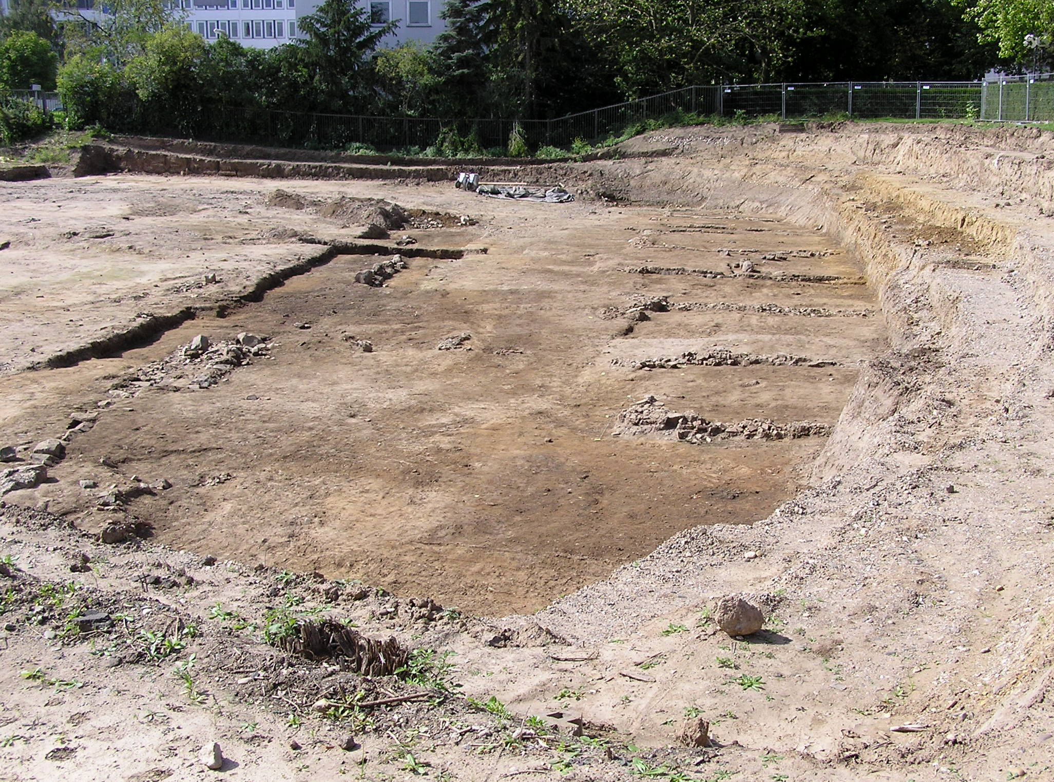 Fundamente von Streifenhäusern des vicus bonnensis (zivile römische Siedlung in Bonn). Rechts ist der breite Kanal zu sehen, der die Abwässer der Siedlung zum Rhein führte. Dazwischen verlief wahrscheinlich eine Straße, die zu einem Hafen am Rhein führte.